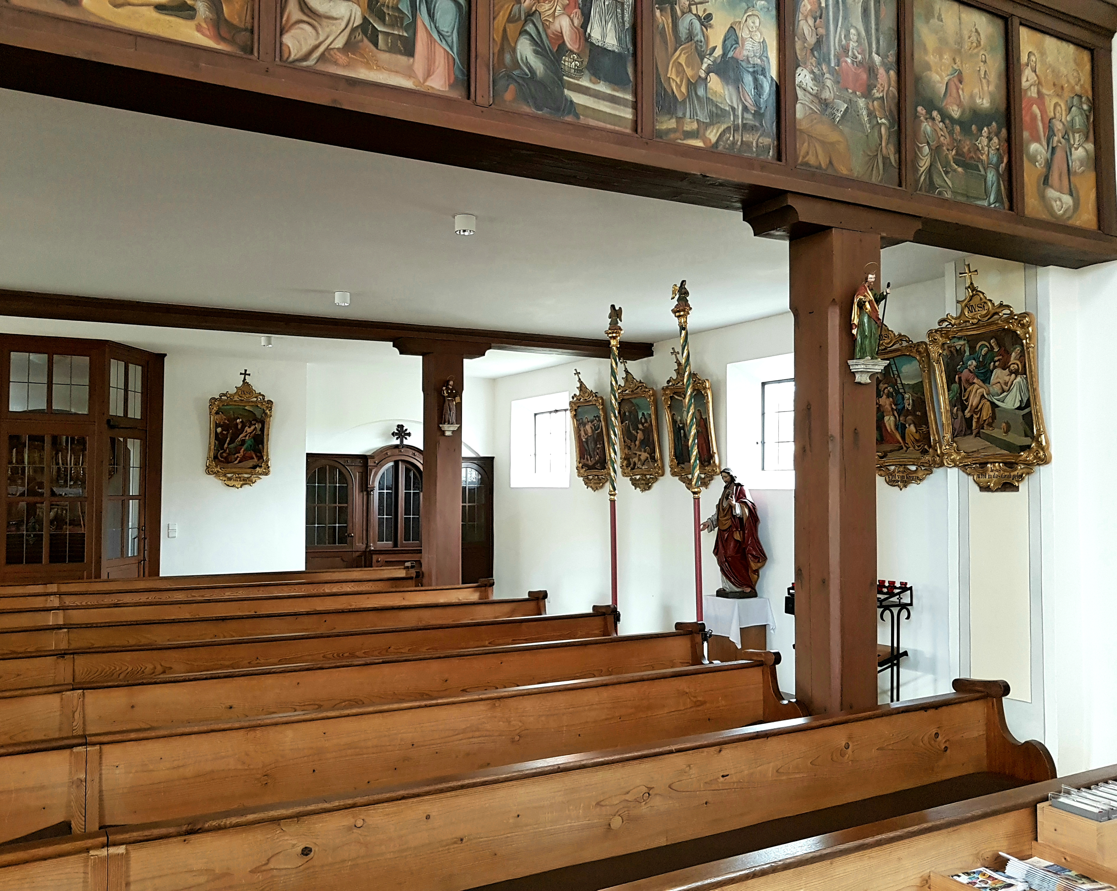 Sankt Andreas (Sauerlach), Kreuzwegbilder unterhalb der Empore.